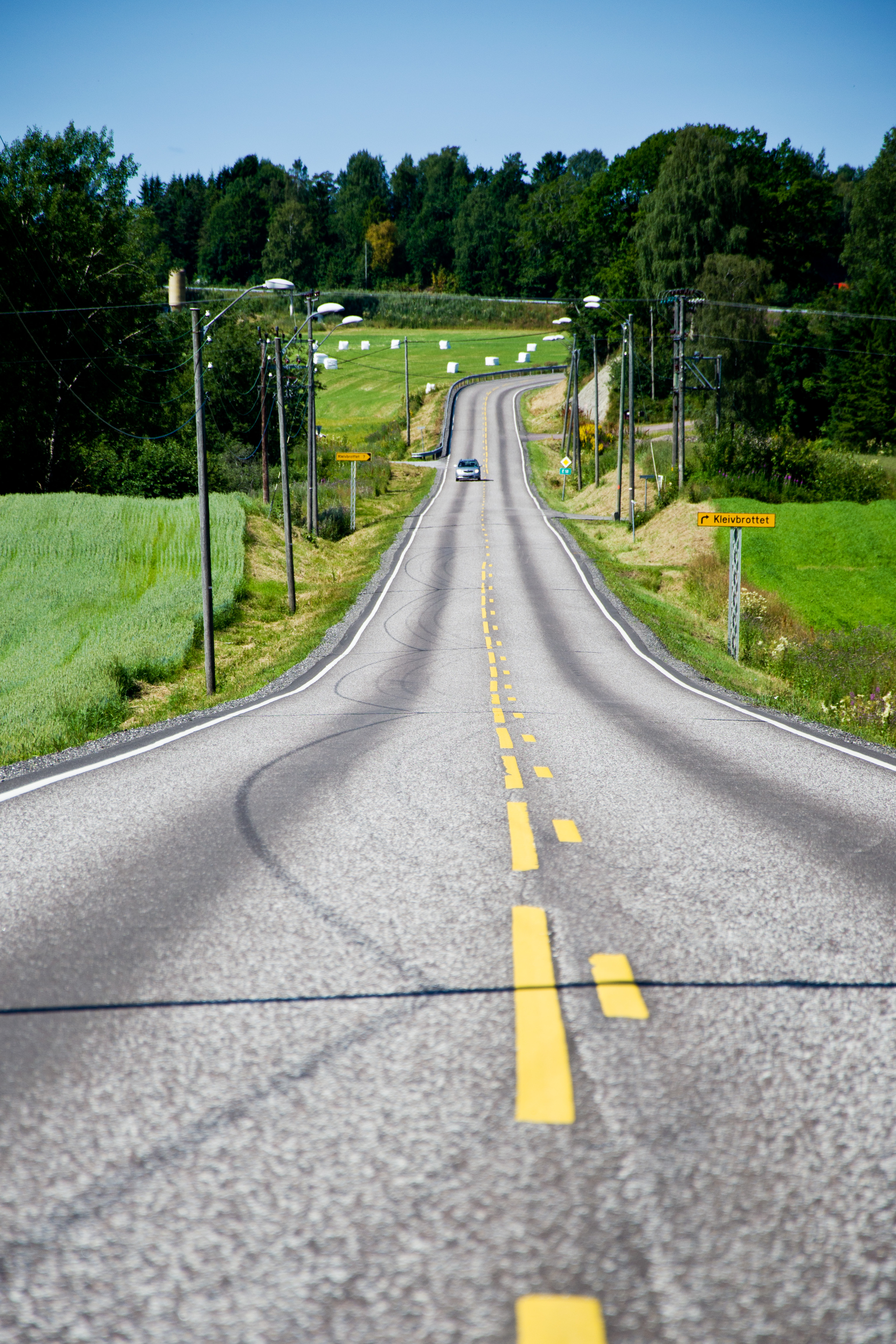 Fylkesvei 680 Kopstadveien i Horten, Vestfold